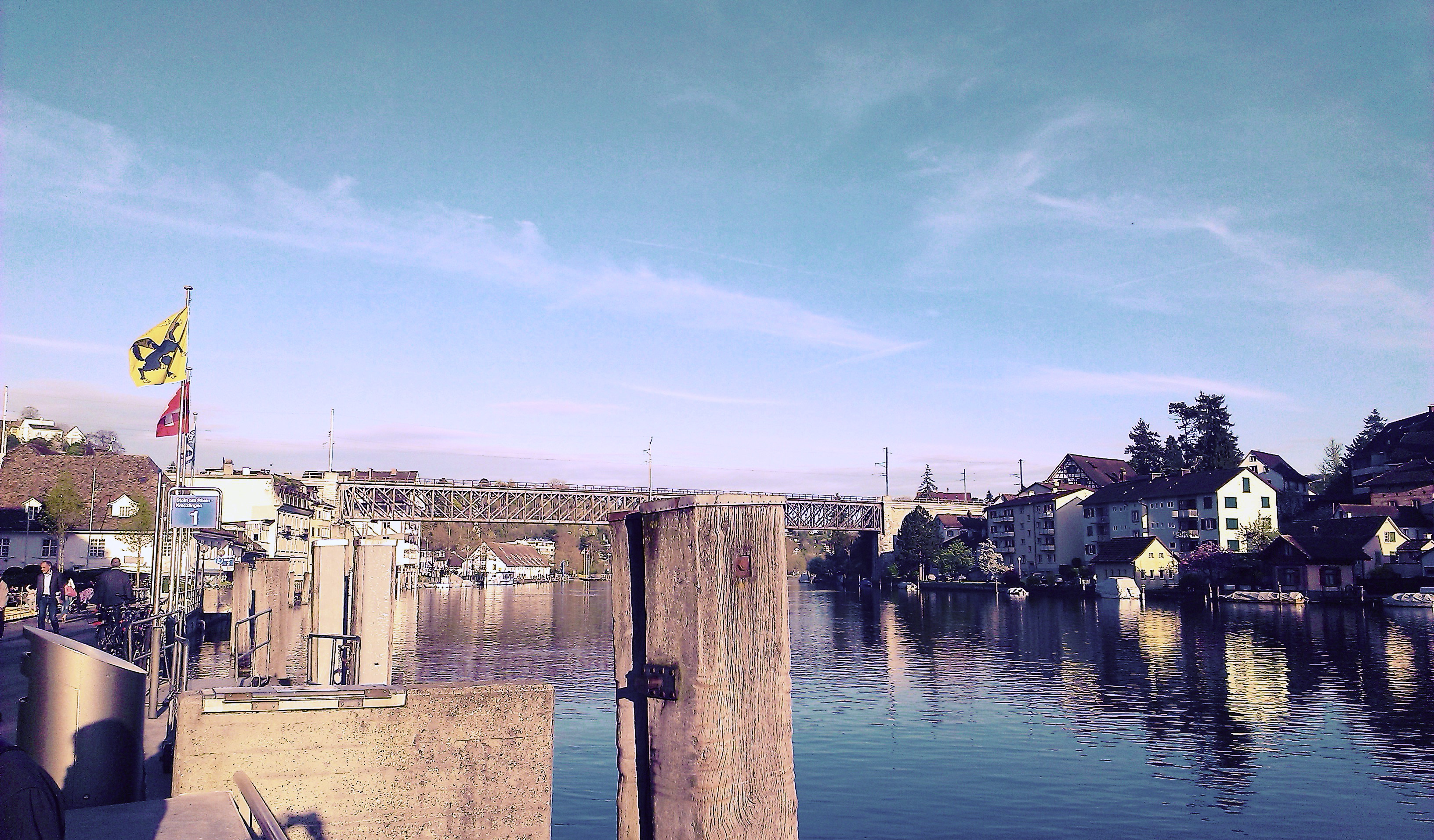 Rhein Schaffhausen in Richtung Büsingen (D)